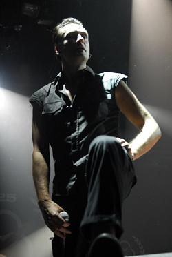 Jürgen Engler von den Krupps live auf dem Tollwood München